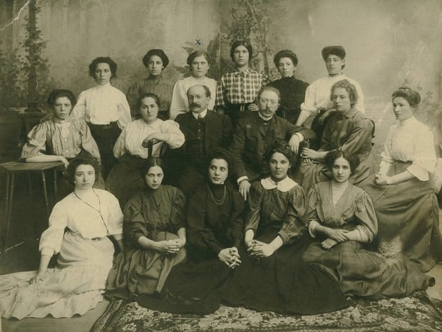 Васіль Счансновіч (у 2 шэрагу 2-ці справа) з выпускніцамі фельчарска-акушэрскай школы. 1908. Фота з фондаў Віцебскага абласнога краязнаўчага музея